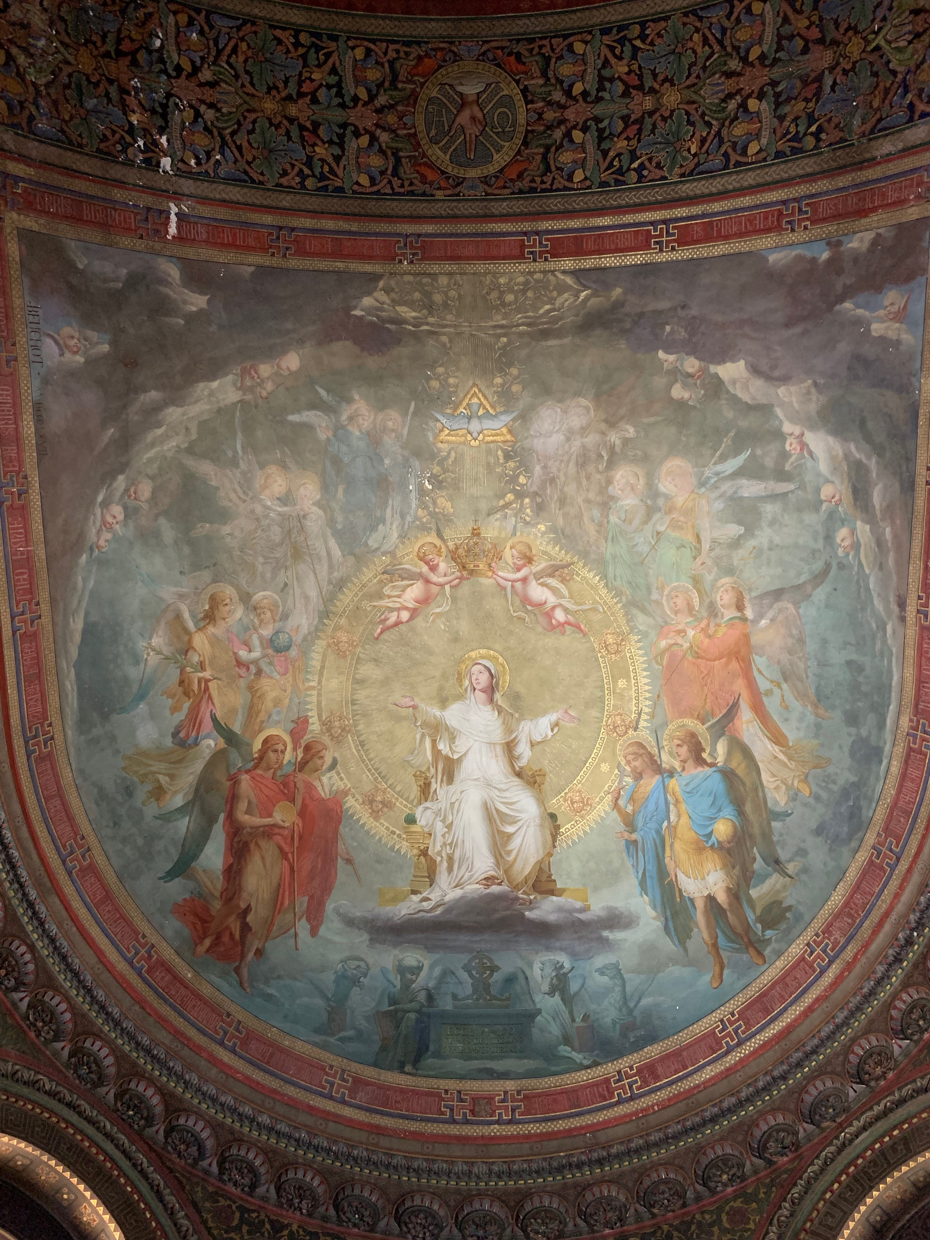 Intérieur de l'église Saint-Pierre de Mâcon le 6 juillet 2019.